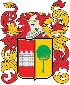 Escudo de Armas